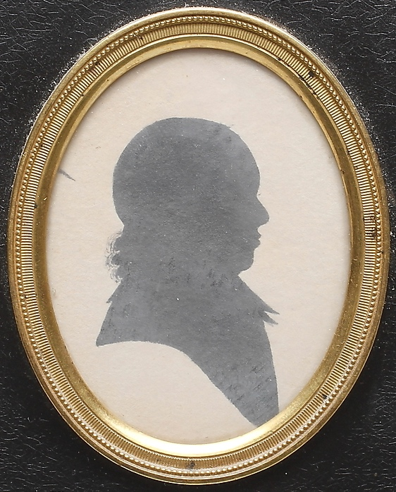 Porträtt av Fredrik Thollander (1731-1772), Thollander var filosofie doktor och kyrkoherde. Okänd konstnär ca 1760.